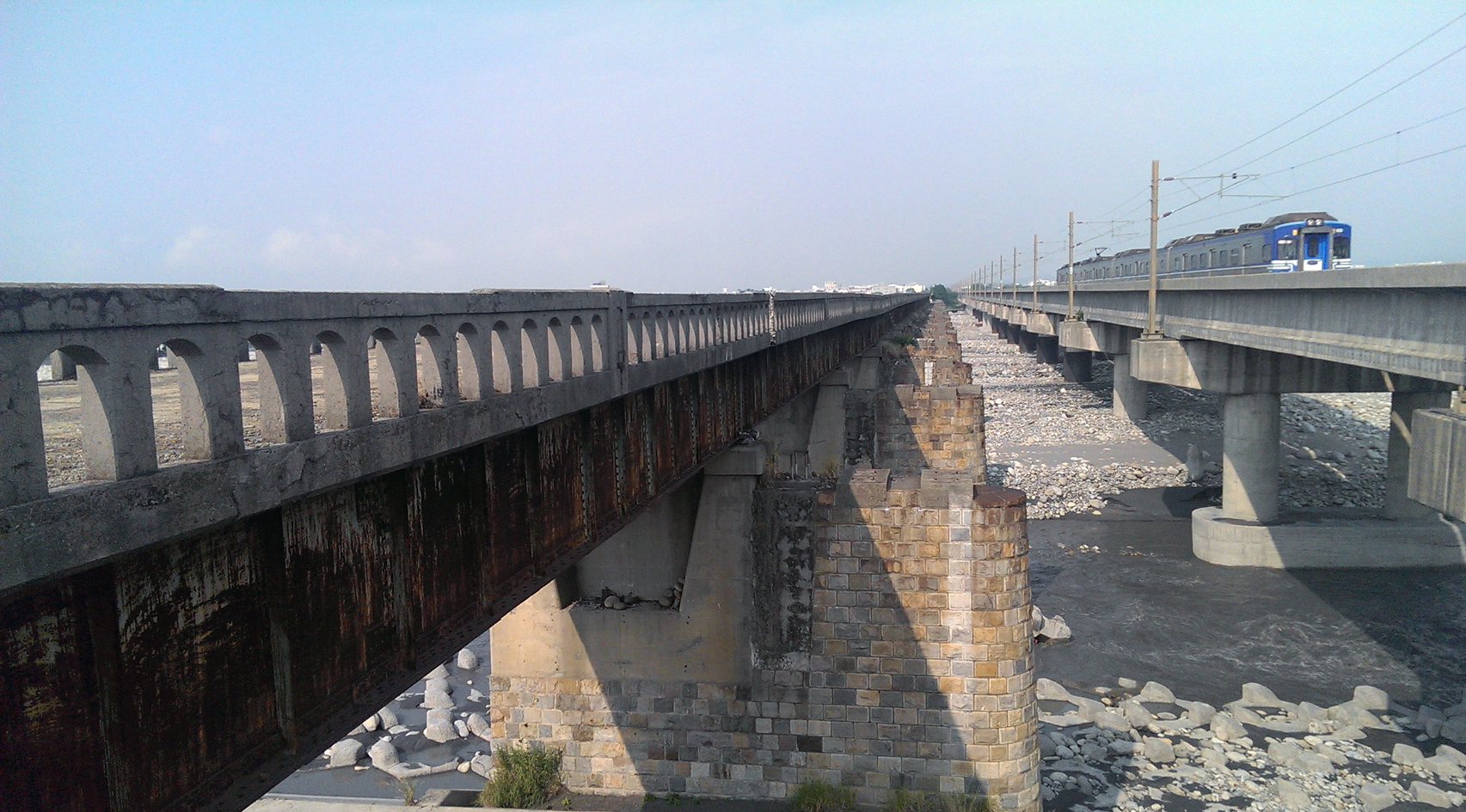 舊大安溪橋(鐵公路共構，鐵路橋面已拆除)與大安溪鐵路橋